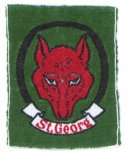 DPSG-Wolfskopf um 1955. Sein Aussehen ist sehr ähnlich wie dem vor dem Verbot der Kluft 1934. Man trug ihn damals auf dem Schiffchen und in den 1950er Jahren auf dem Kluftpullover.